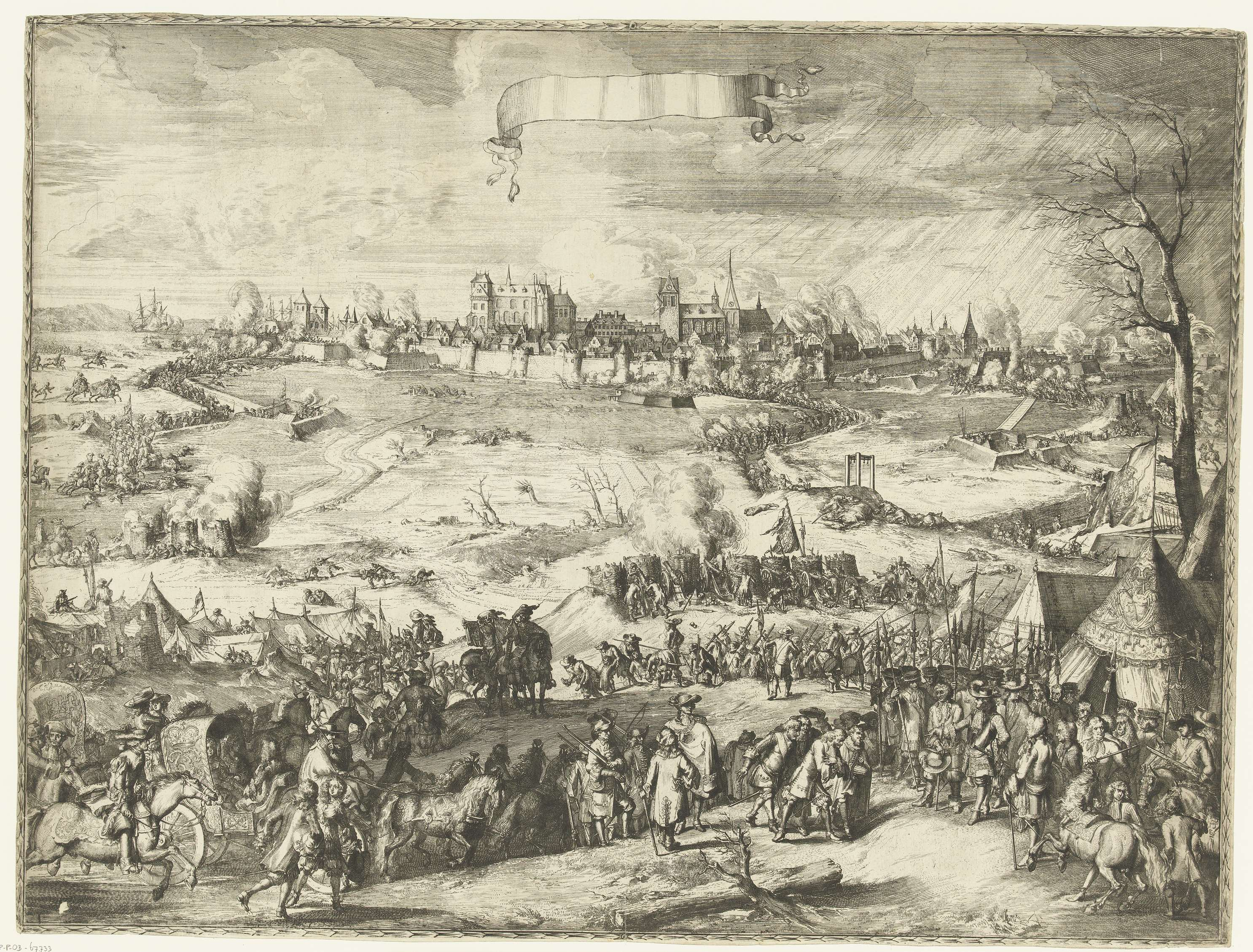 Belegering en verovering van Wismar door het Deense leger, van 17 oktober tot 18 november 1675. Op de voorgrond, rechts de ontvangst van de verslagen Zweden door koning Christian V van Denemarken. Op de achtergrond de Deense aanval op Wismar. Midden boven de voorstelling een lege banderol